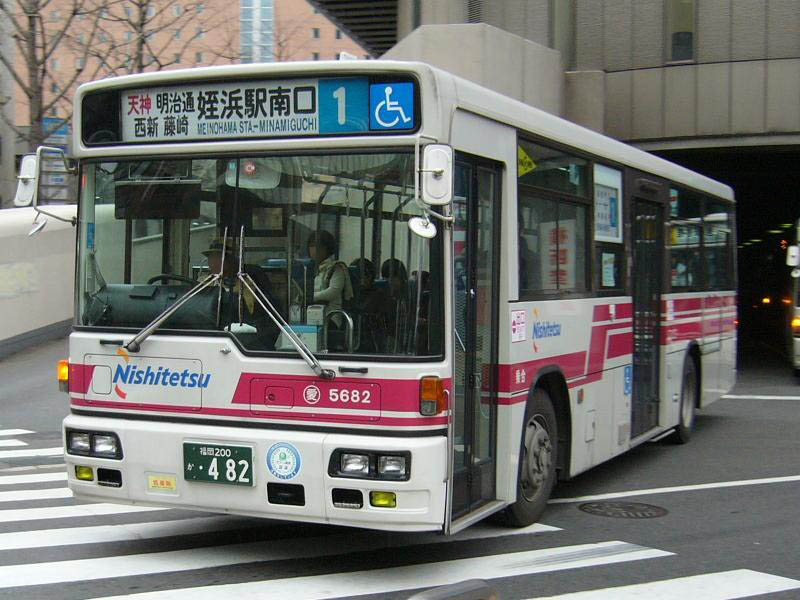 登録番号 福岡200か・482 西日本鉄道愛宕浜自動車営業所 車番5682 2006年1月16日 博多駅前にて撮影